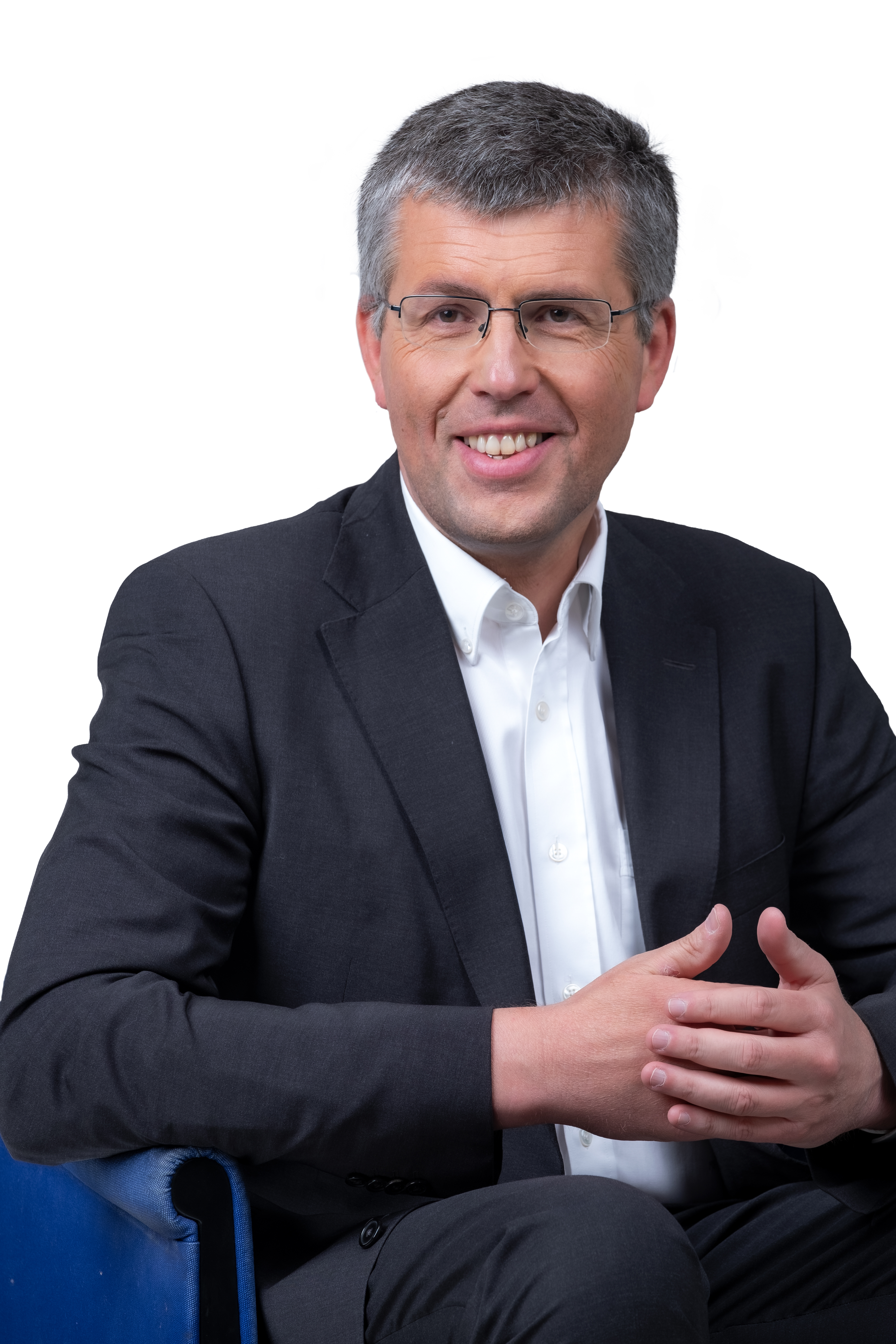 Perchtoldsdorf